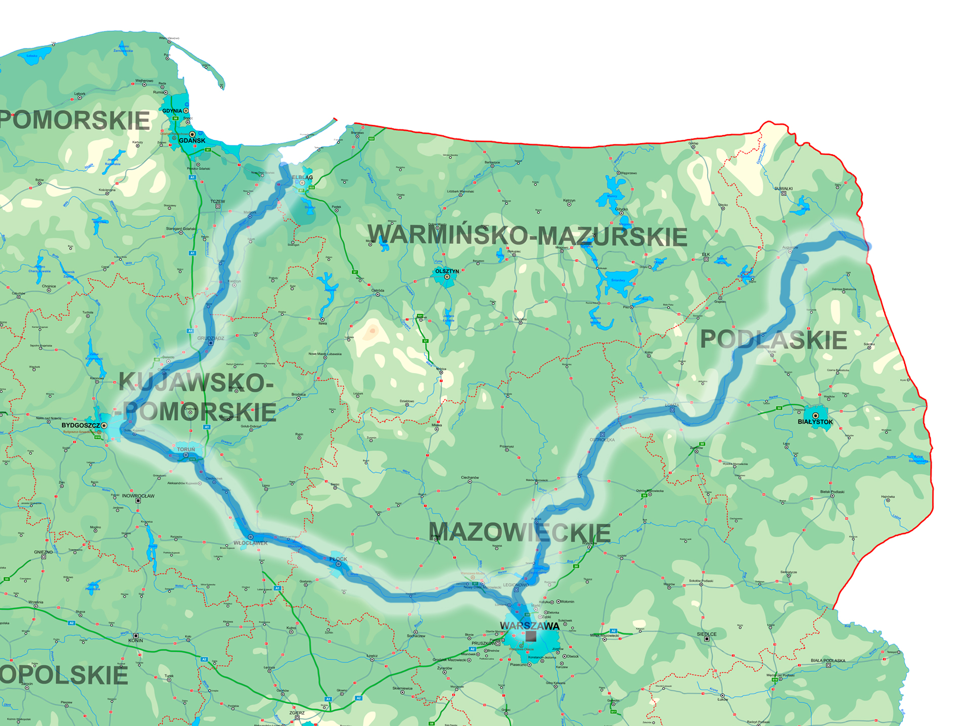 Mapa Wodno-Turystycznego Szlaku im. Króla Stefana Batorego na podstawie Mapy Polski autorstwa MRN